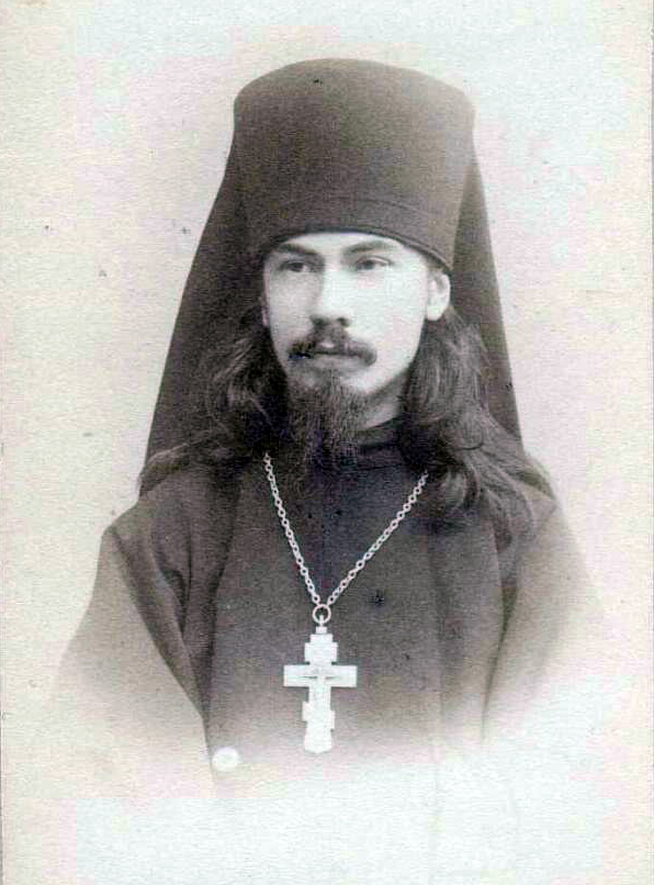 иеромонах Феофан (Быстров). Санкт-Петербург